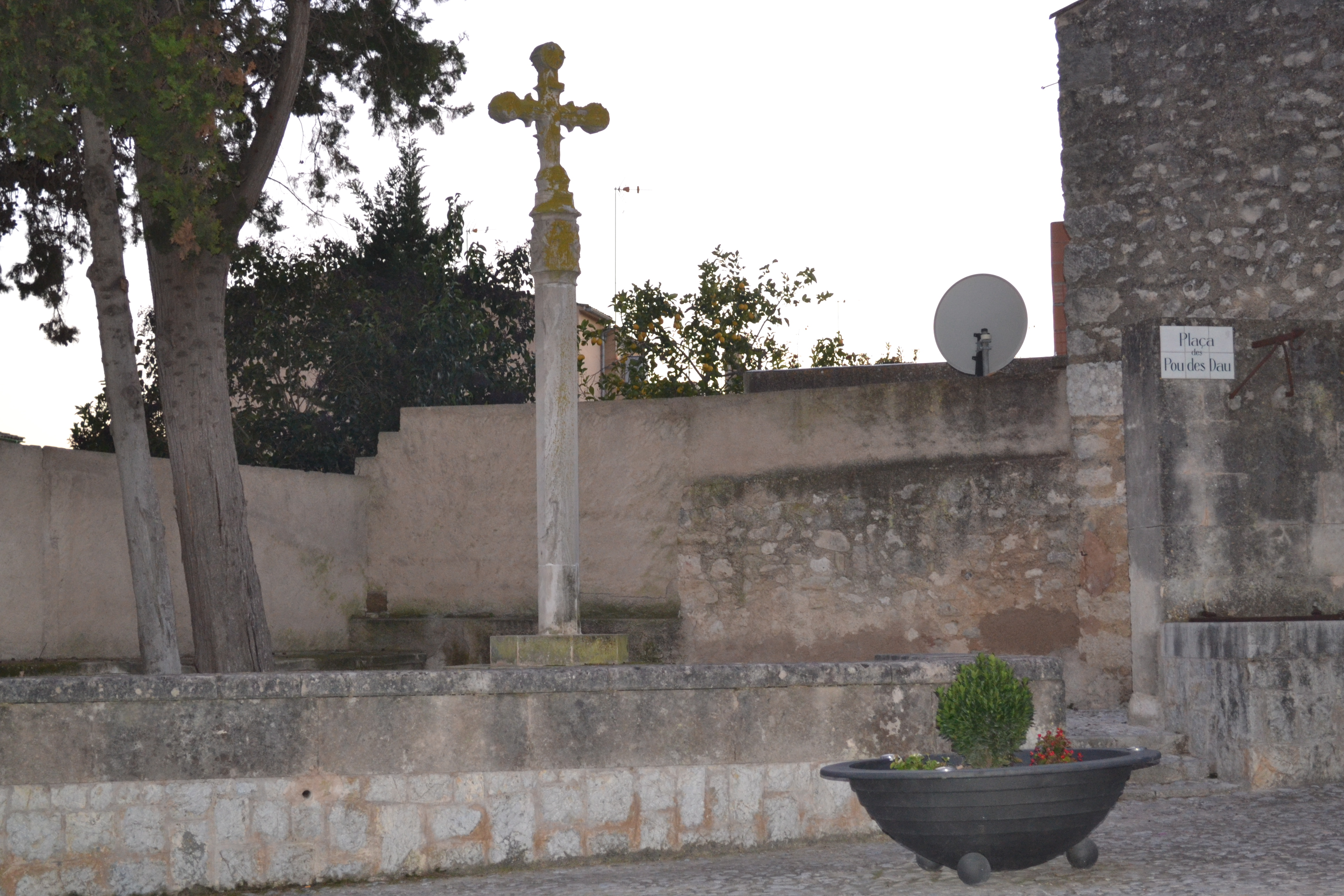 La creu de terme, anomenada de Son Rafel Mas, al nou emplaçament del pou del Dau (Montuïri)